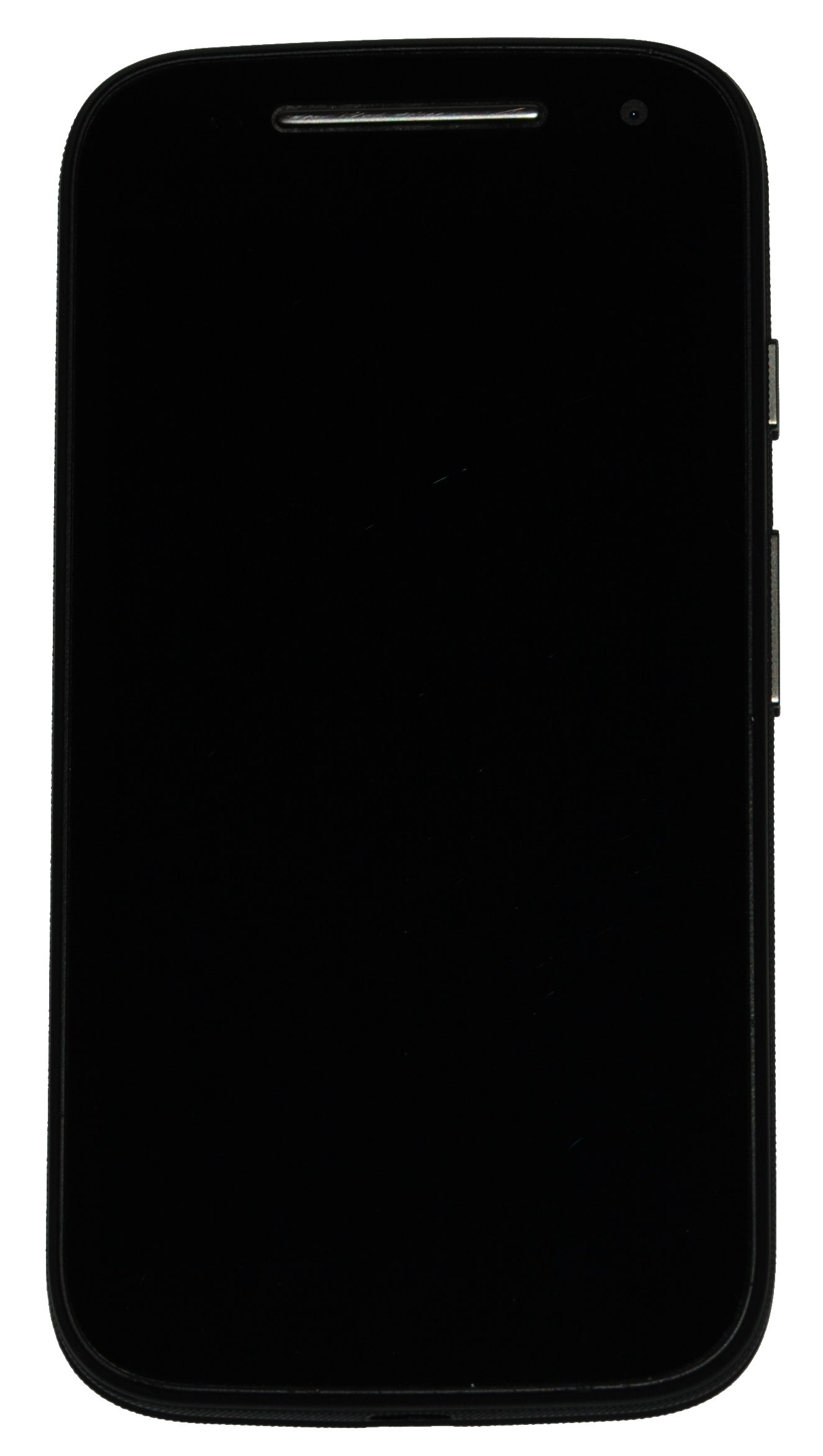 Motorola Moto E (2nd generation 4G LTE)